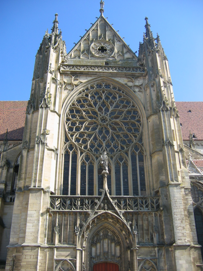 Cathédrale de Sens, Yonne, France : portail sud